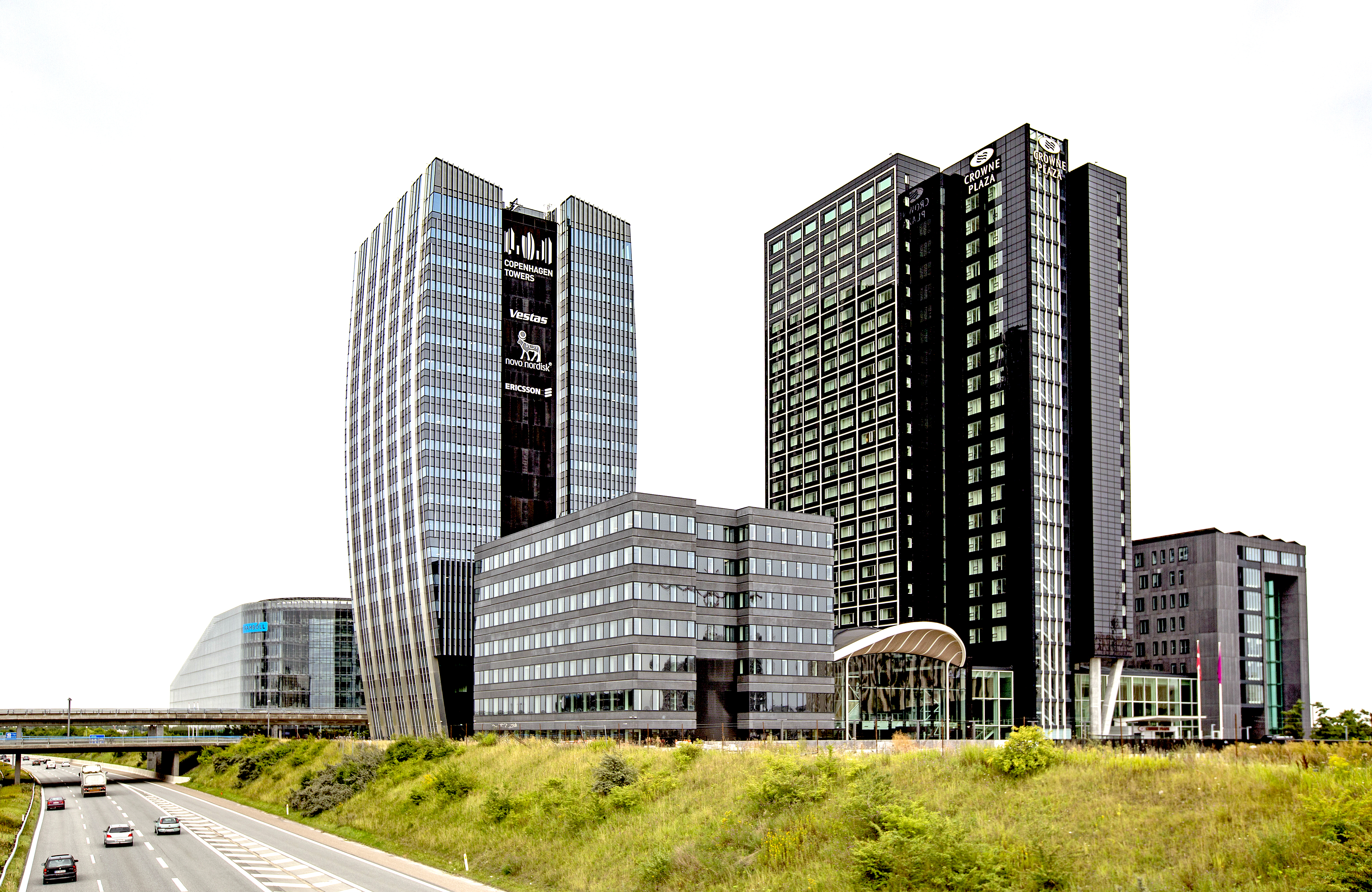 Höghuset Copenhagen Towers i Ørestad i Köpenhamn med hotellet Crowne Plaza. Danska regeringen har erbjudit den europeiska läkemedelsmyndigheten EMA fri hyra under 20 år i kontorshuset Copenhagen Towers om EMA flyttar till Danmark..Photo: News Øresund - Jenny Andersson.© News Øresund - Jenny Andersson (CC BY 3.0).. .Detta verk av News Øresund är licensierat under en Creative Commons Erkännande 3.0 Unported-licens (CC BY 3.0). Bilden får fritt publiceras under förutsättning att källa anges. .The picture can be used freely under the prerequisite that the source is given. News Øresund, Malmö, Sweden.News Øresund är en oberoende regional nyhetsbyrå som är en del av det oberoende dansk-svenska kunskapscentrat Øresundsinstituttet...